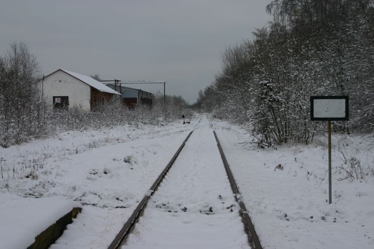 Bahnhof Hranice v Čechách